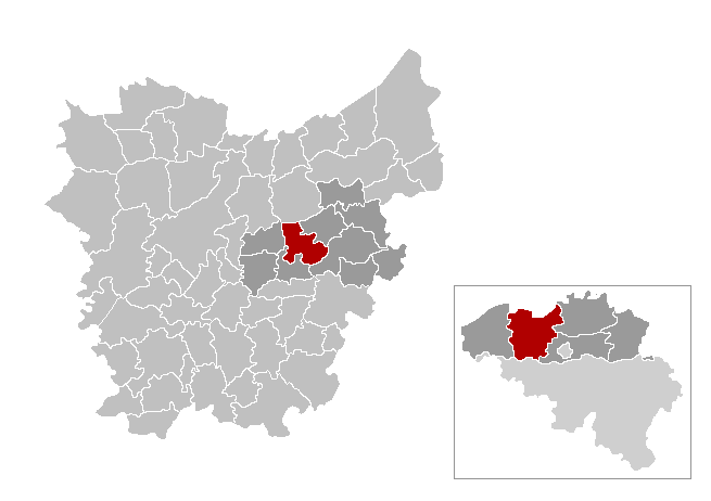 Gemeentekaart Berlare